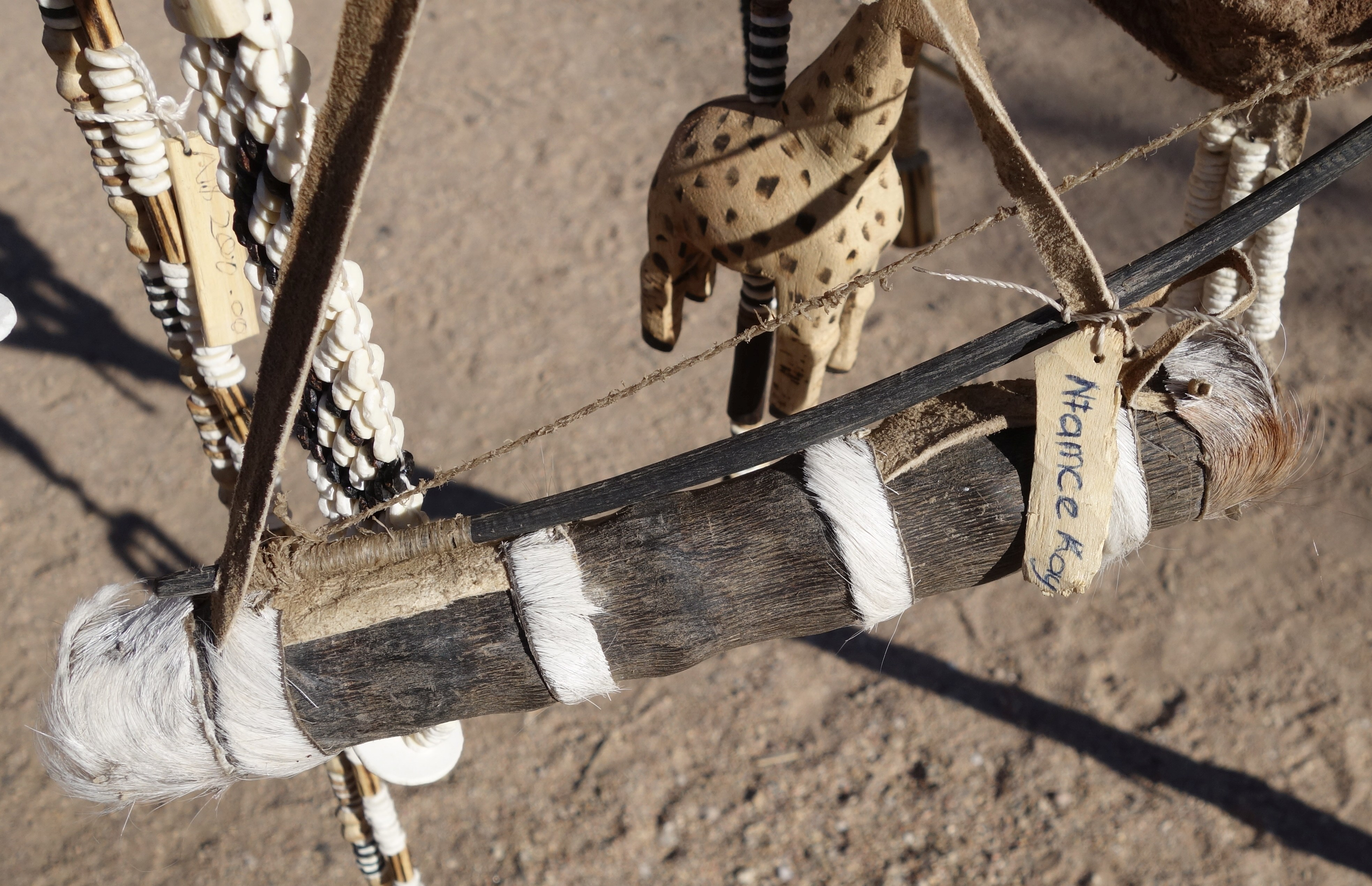 Namibia, Nan-Touristenattraktion Nähe Ai Aiba Lodge. Pfeilköcher der San (Ntamce Koy).